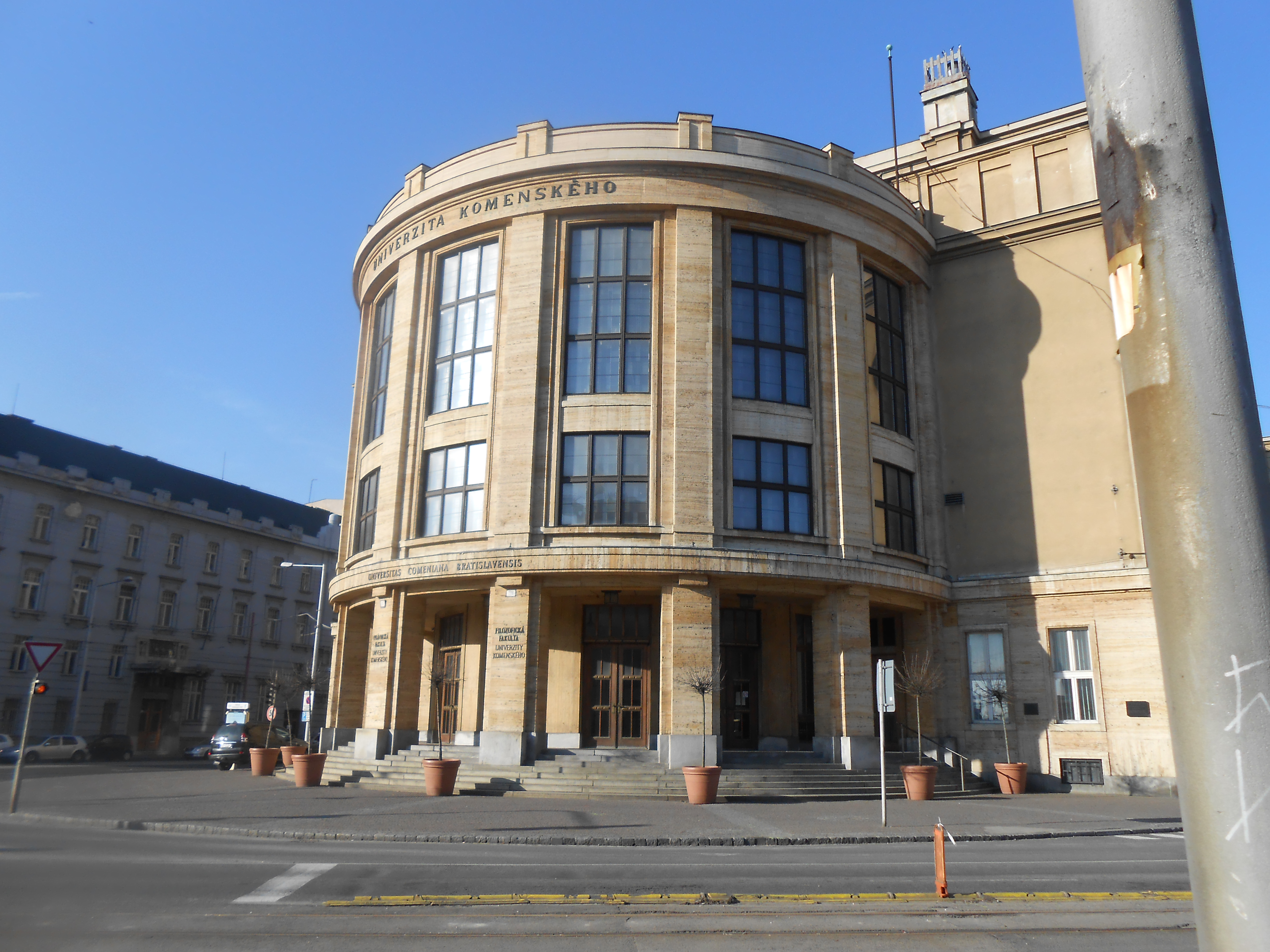 Hlavná budova Univerzity Komenského v Bratislave